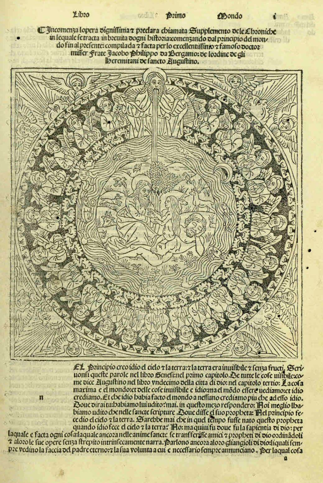 Supplementum chronicarum (italiano). - Impresso nella inclita citta de Venetia : per me Bernardino Rizo de Novara, lanno dela nostra salute 1491 adi 8 de Octobrio. - 308 c. ; aa¹⁰, a-z⁸, [et]⁸, [us]⁸, [rum]⁸, A-K⁸, L¹⁰ ; fol. - Marca tipografica nell'explicit .